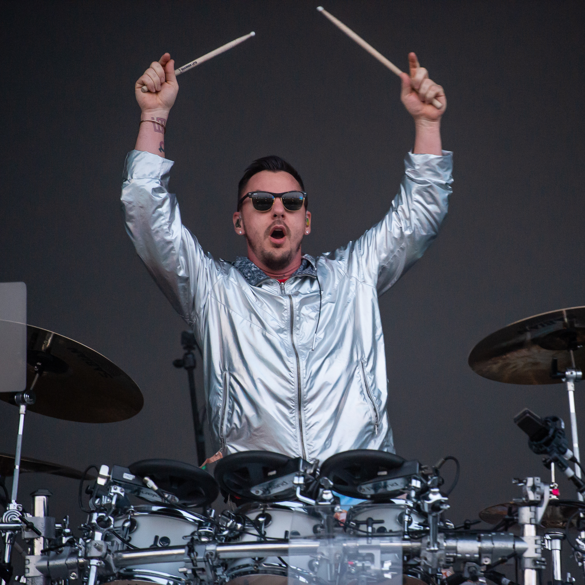 ARGO-Konzerte,Festival,Konzert,Livekonzert,Livemusik,Musik,RiP,Rock im Park 2018,Shannon Leto,Thirty Seconds to Mars,Zeppelin Stage